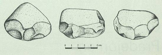 Cuarcitas trabajadas en Cantarroyuela, por P. Utrilla, R. Domingo y A. Pérez.